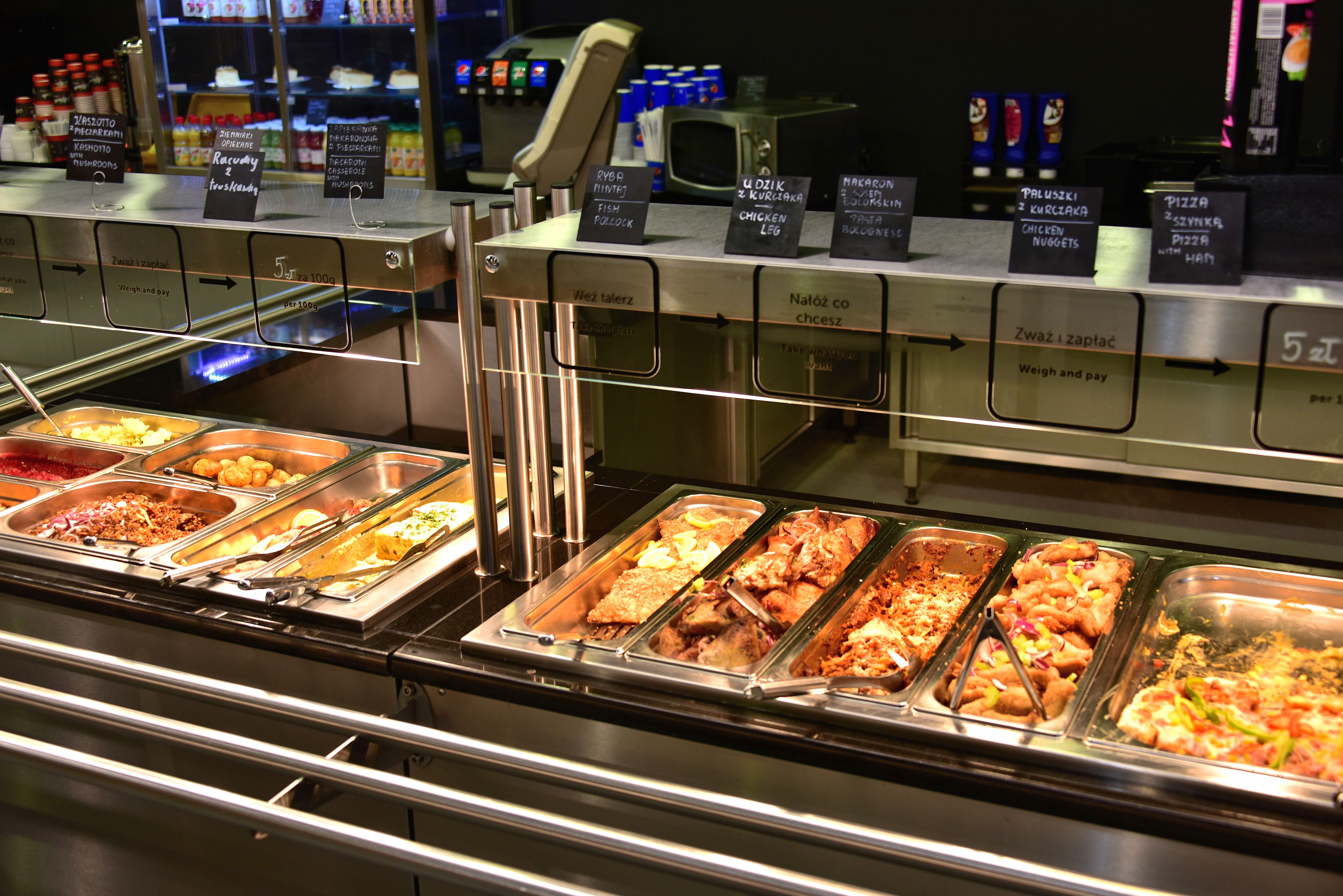 Bar samoobsługowy w Centrum Nauki Kopernik w Warszawie